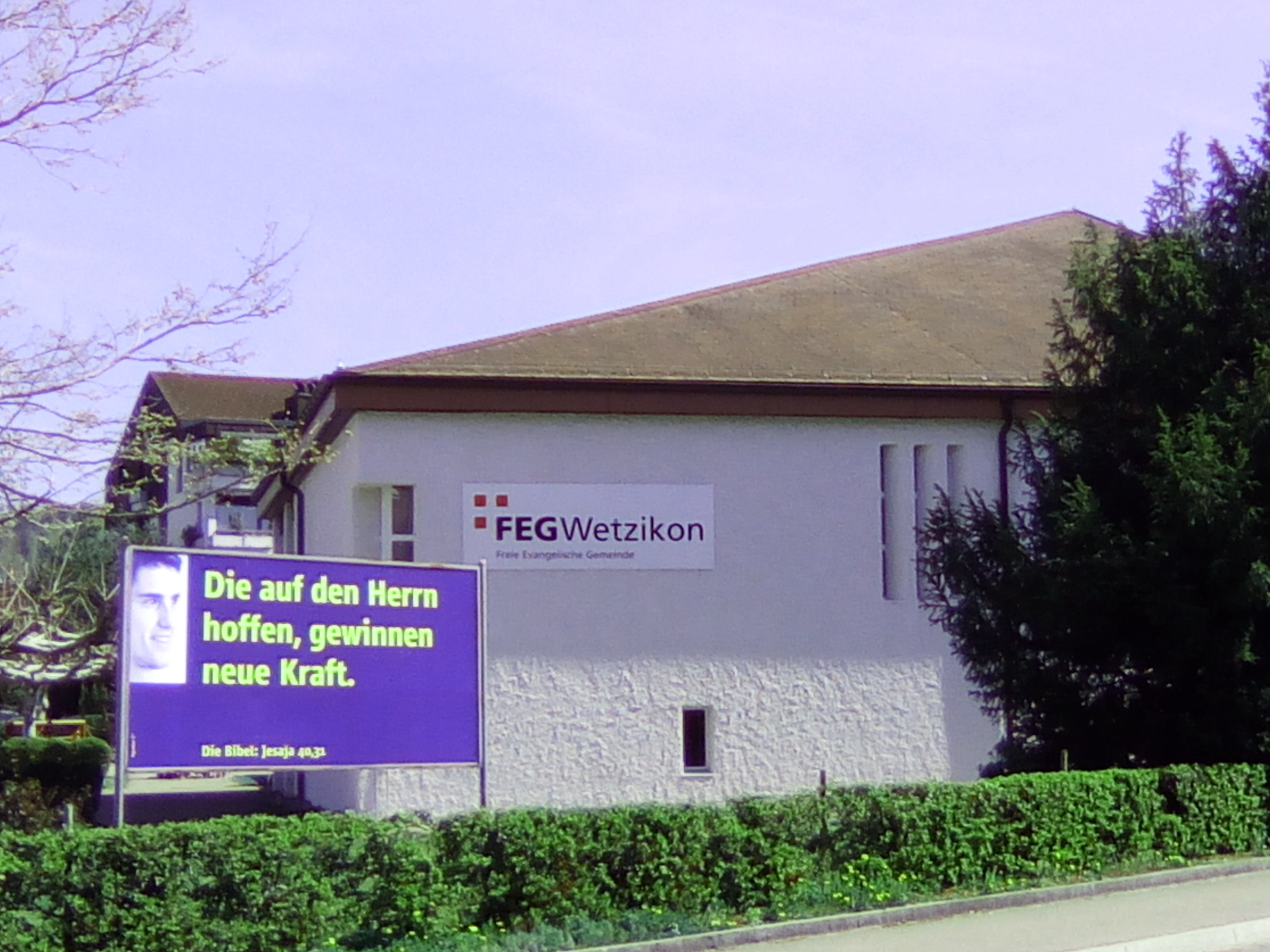 Freie Evangelische Gemeinde Wetzikon: Entstanden 1868, Neubau an diesem Standort, Langfurrenstrasse 2, anno 1982.